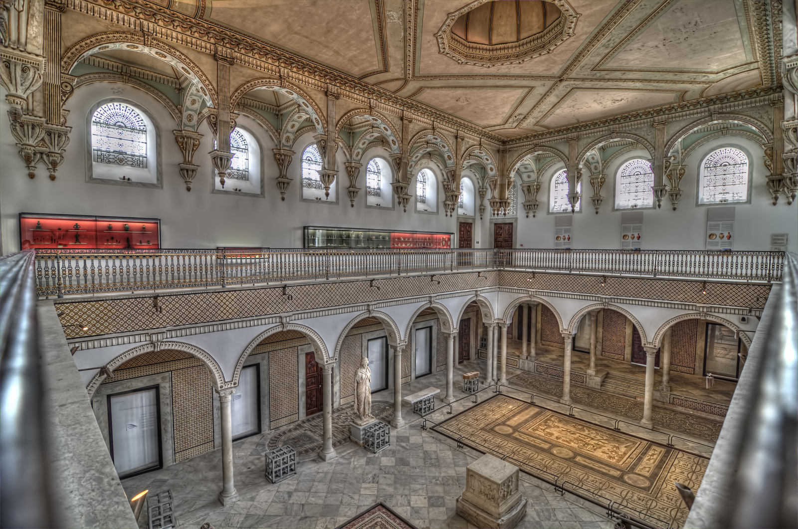 Parties du palais du Bardo antérieures à 1870, Le Bardo